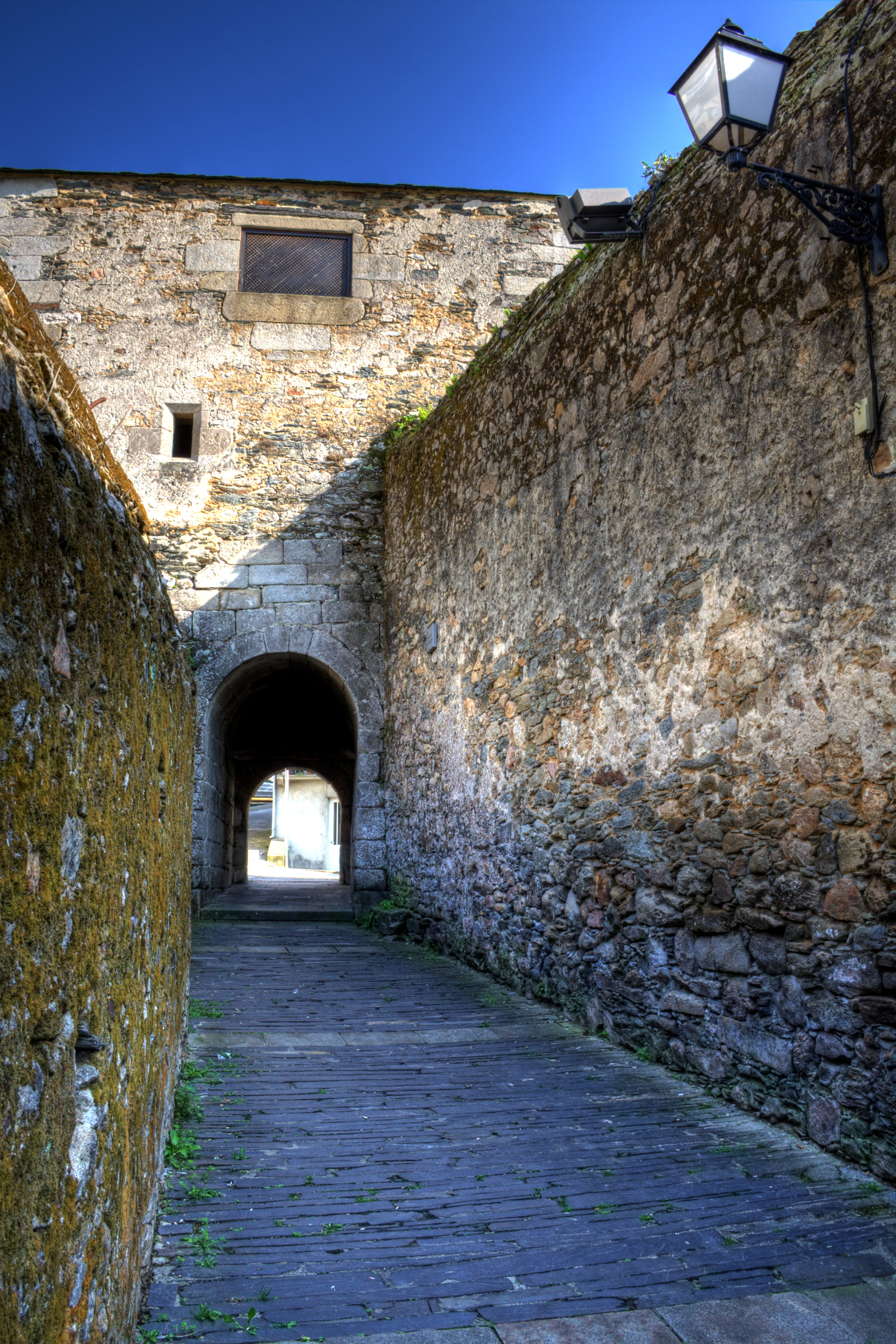 Viveiro, Porta do Valado y Calexa das Monxas